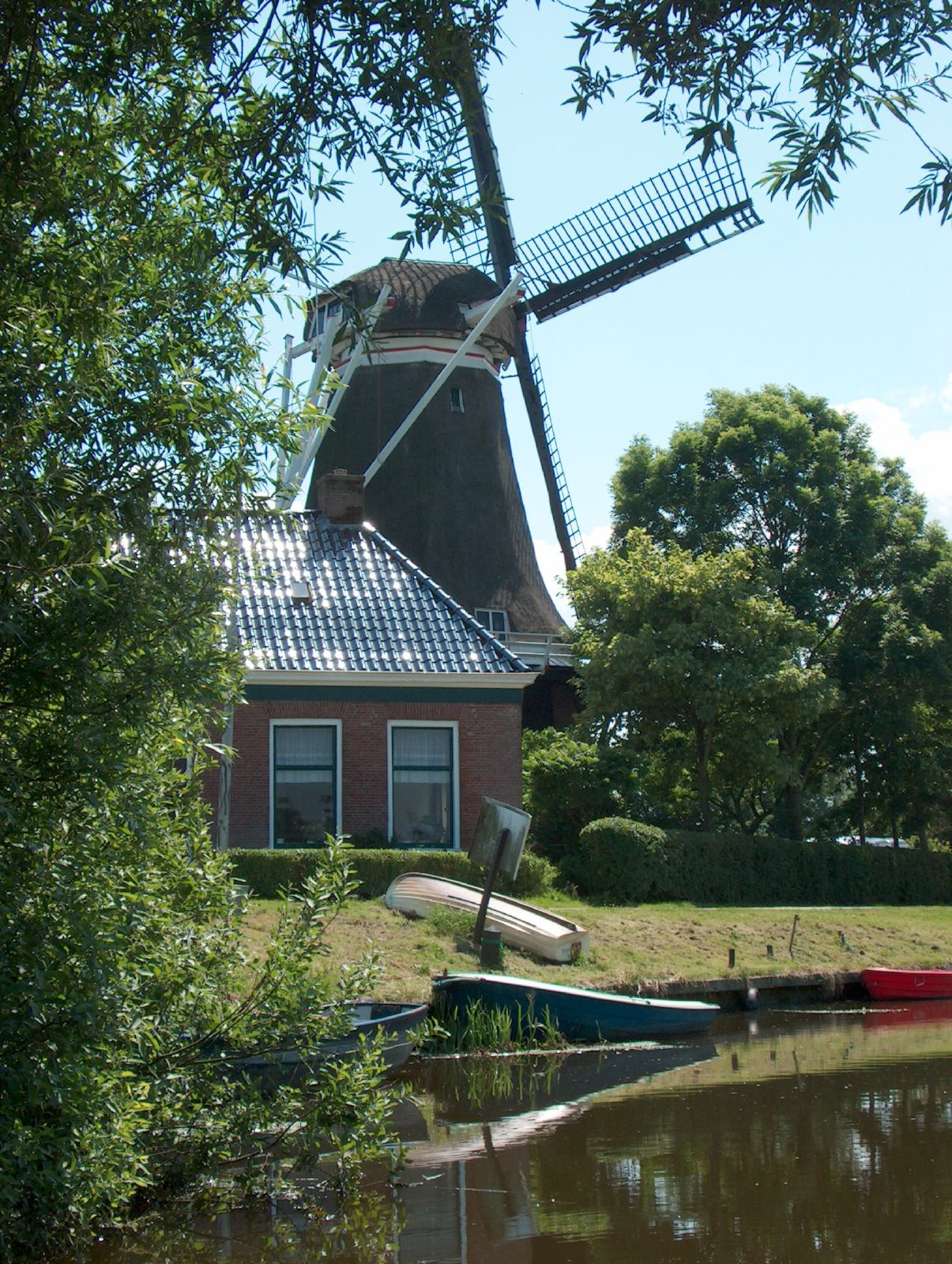 De Hoop, windmolen in Holwerd